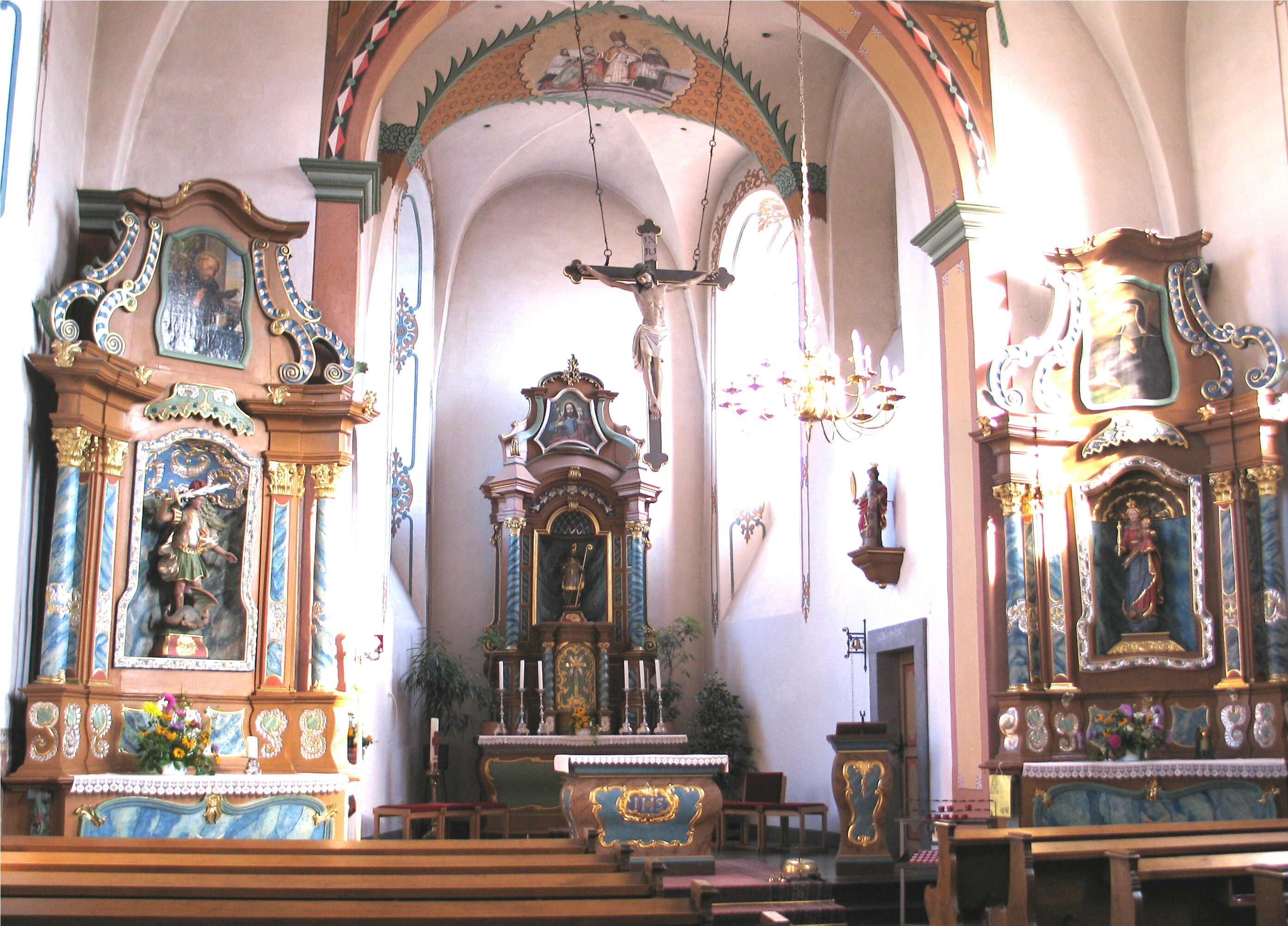 An der Kierch vu Butzweiler (Däitschland)